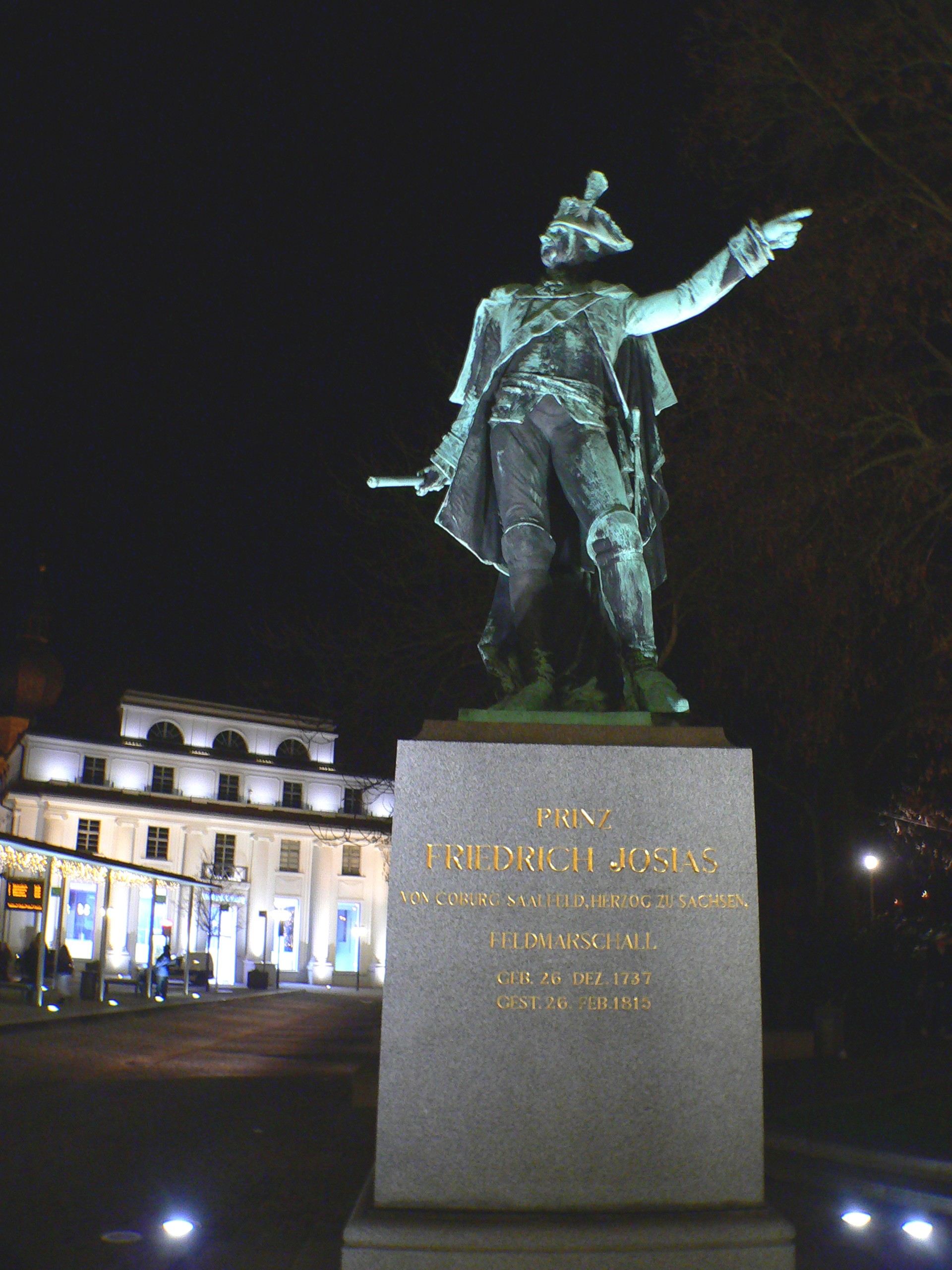 Denkmal von Prinz Josias in Coburg (Bayern), Thaterplatz (D-4-63-000-532)